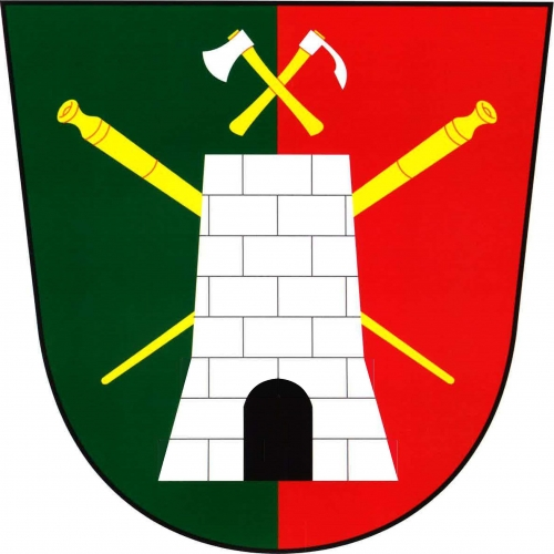 Znak, Pec, okres Domažlice. "V zeleno-červeně polceném štítě volná stříbrná kvádrovaná pec podložená zkříženými zlatými sklářskými píšťalami a převýšená kosmou sekerou šikmo podloženou koplicí, obojí stříbrné na zlatých topůrkách."